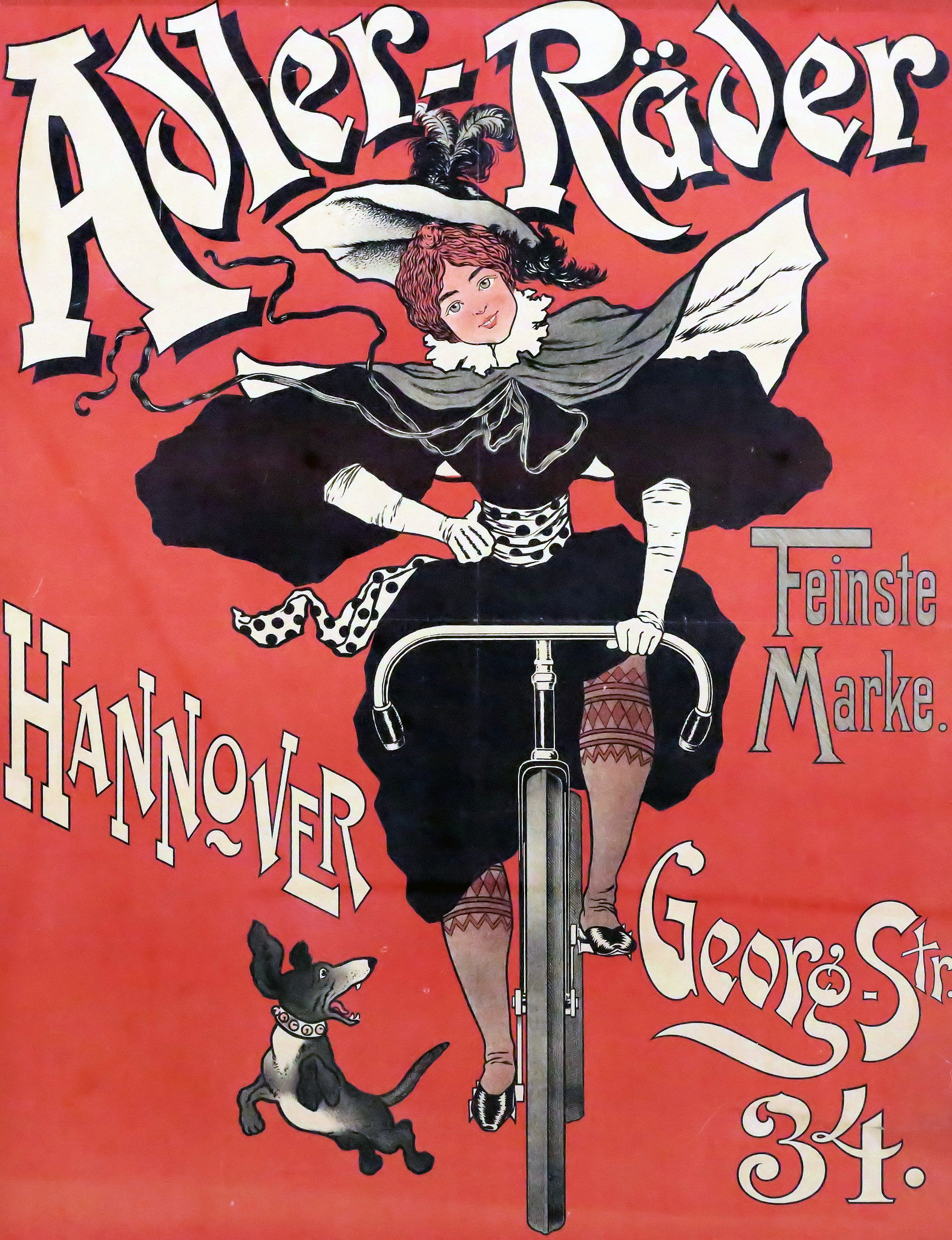 Um 1900 von einem anonymen Künstler entworfenes Plakat mit einer jungen Dame auf einem Fahrrad der Adlerwerke als Werbung für den Verkauf der Adler-Räder in der Georgstraße 34 von Hannover. Der Druck findet sich auch im Sprengel Museum Hannover ...